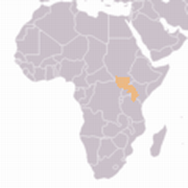 Localisation du peuple Luo